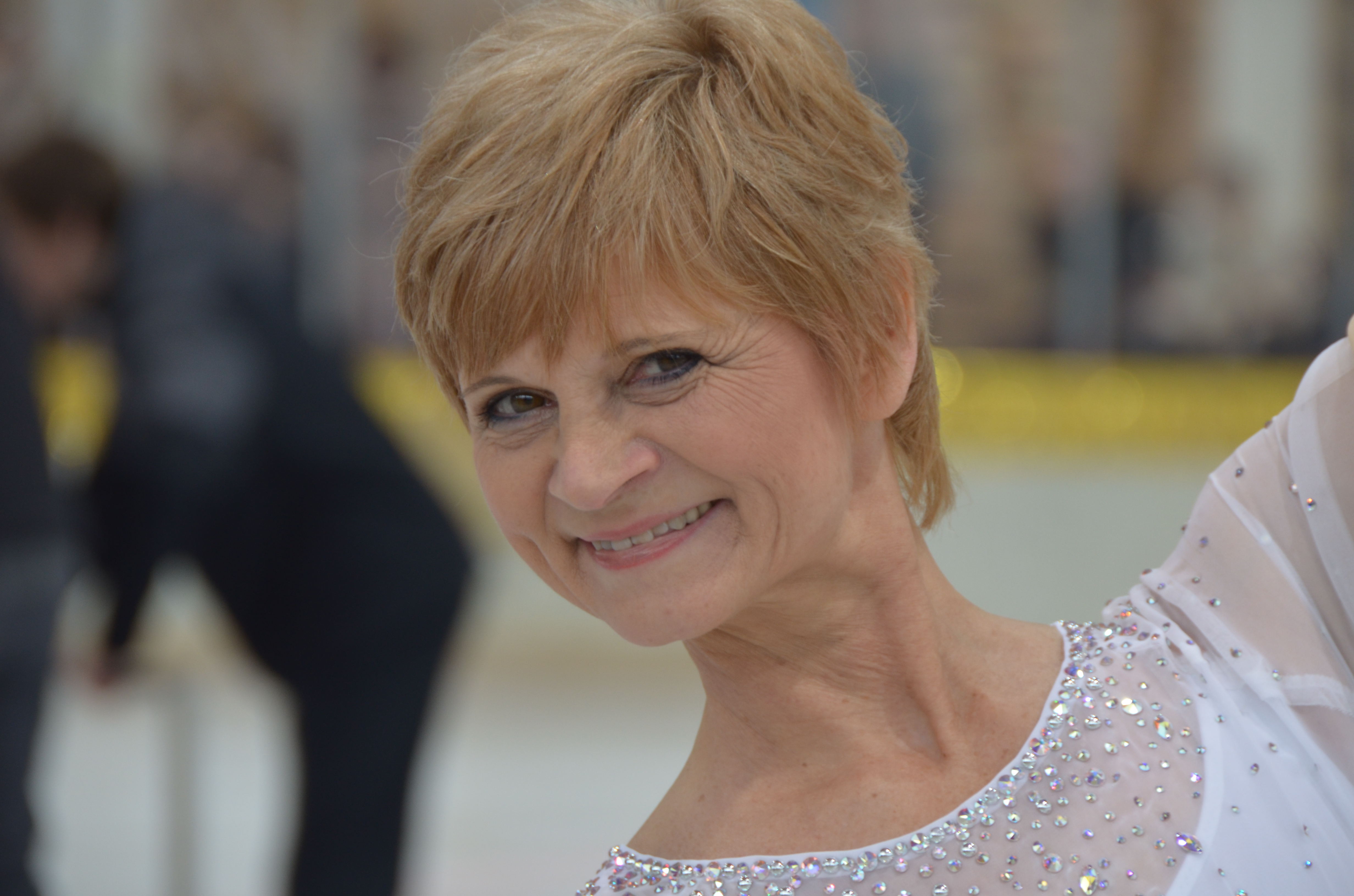 Berlin Sportforum Hohenschönhausen